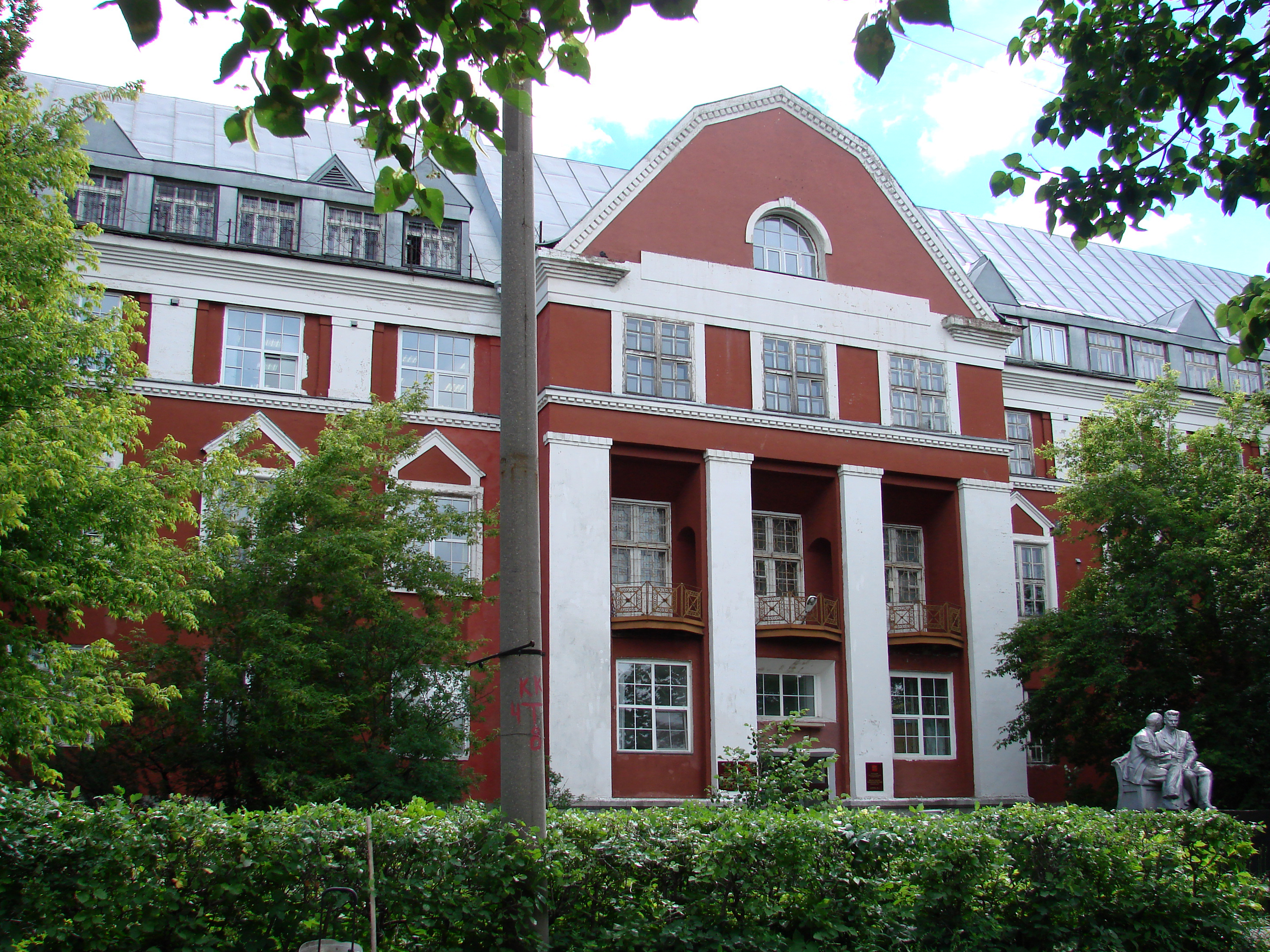 Здание, где в Пермском университете работали физиолог Вериго Б.Ф., Парин В.В., гистолог и зоолог Шмидт В.К., ботаники Сюзев П.В., Рихтер А.А., Генкель А.Г., геолог Преображенский П.И., гистологи Заварзин А.А., Орлов Ю.А., биолог Беклемишев В.Н. и др. Пермь, улица Генкеля, 7